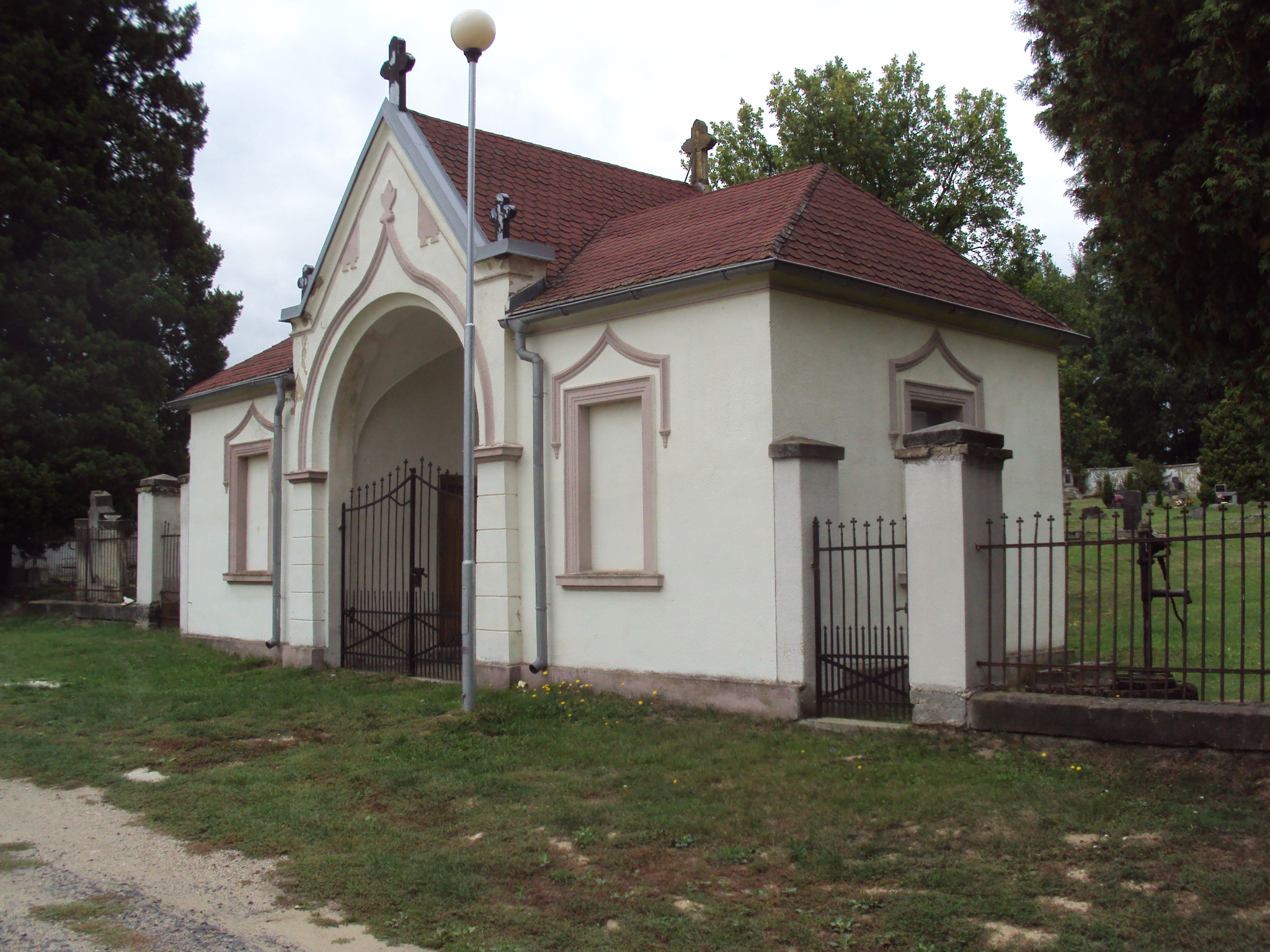 Vstup na nový hřbitov v Libchavě